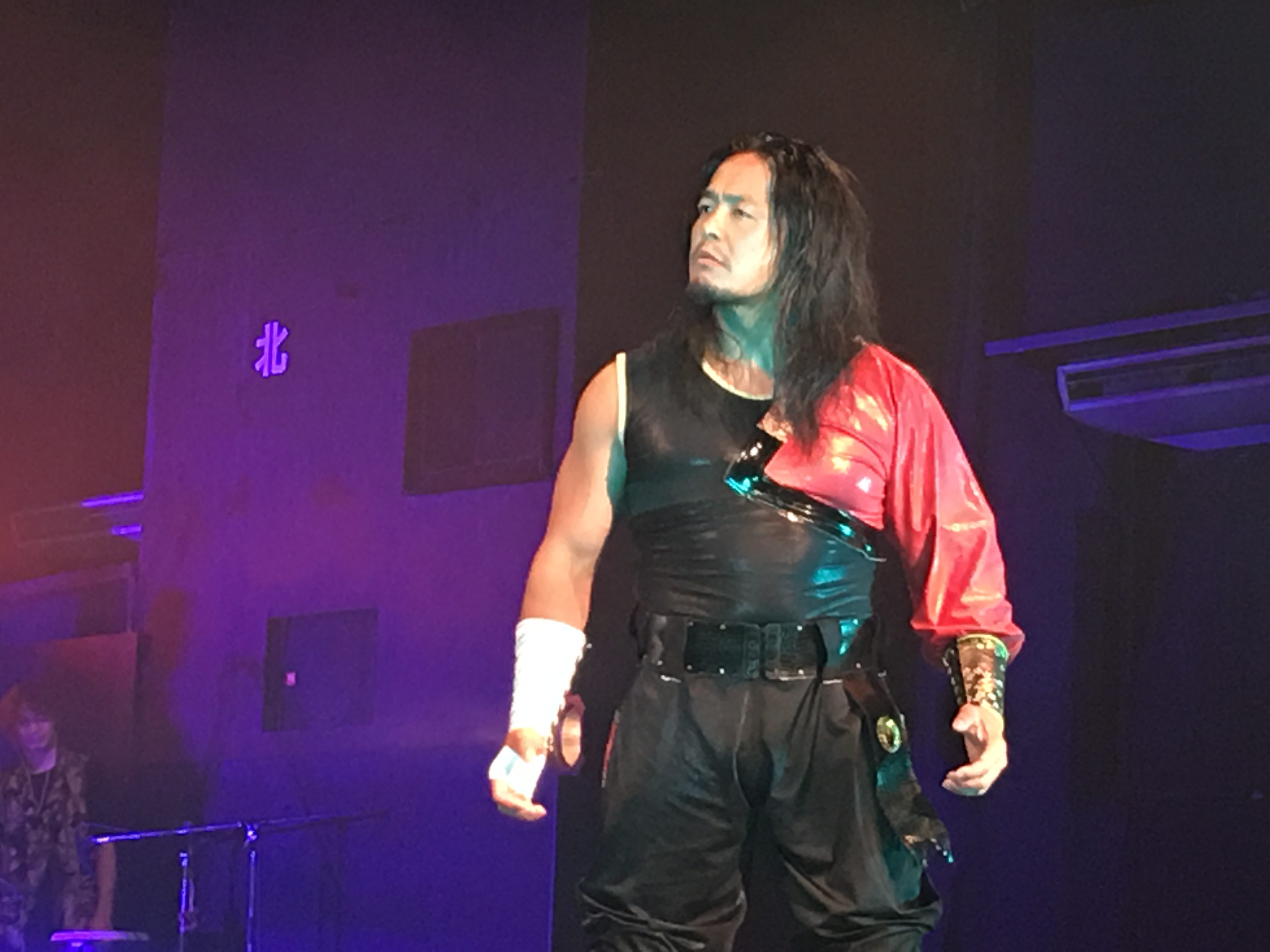 バッファロー（その１）